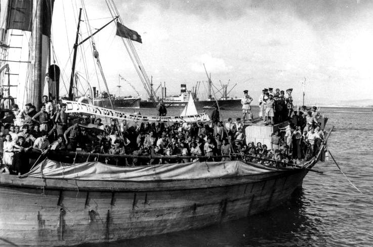 אוניית המעפילים חביבה רייק - מניפים כרזה בסיפון